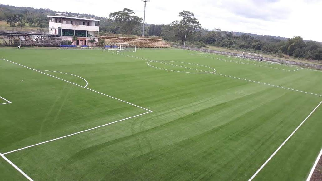 FFB-Field Belmopan Belice Proyecto Goal FIFA